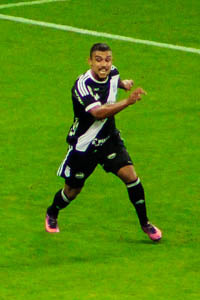 William Pottker à época de Ponte Preta